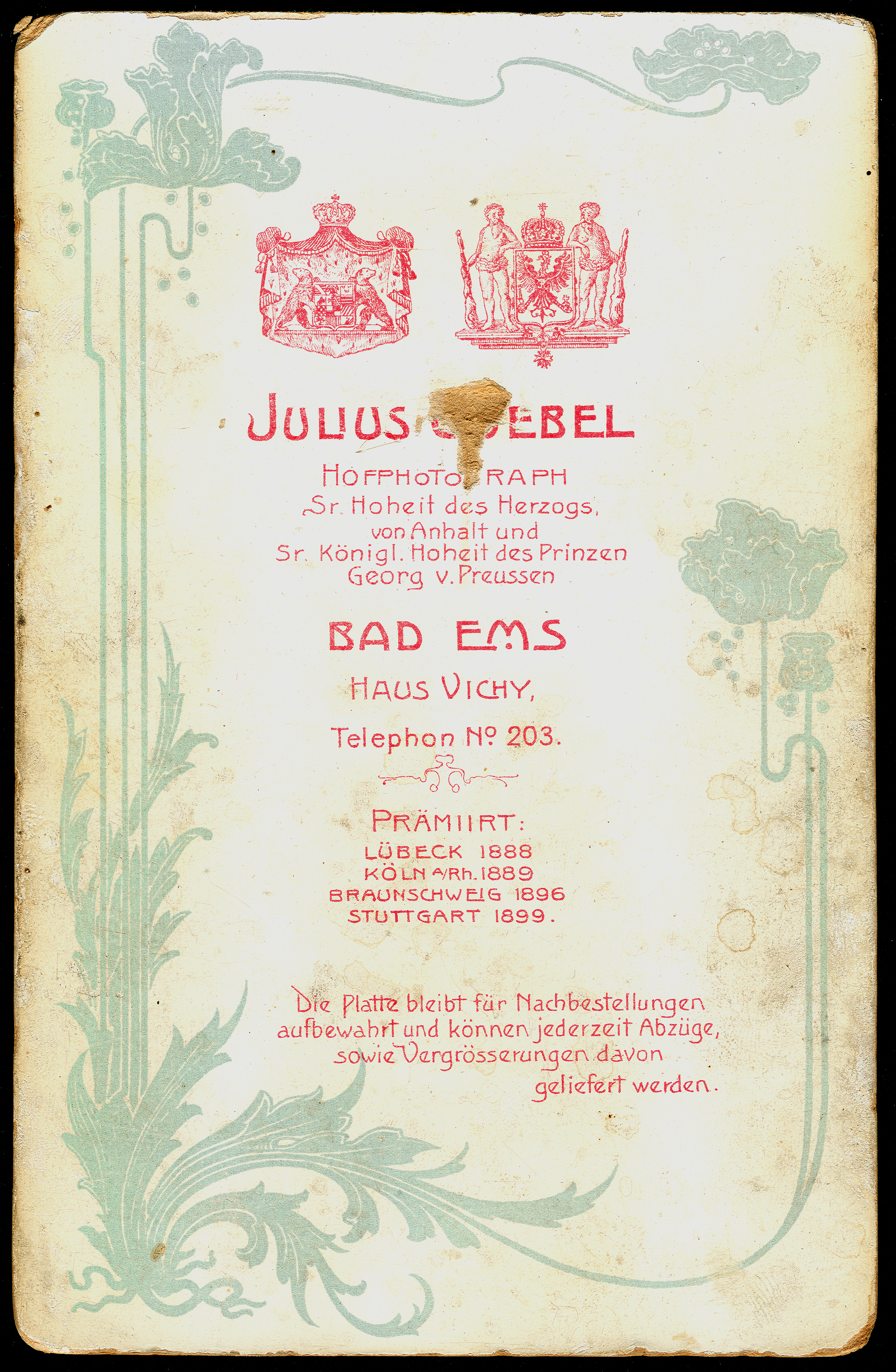 Rückseite Revers der Fotografie im Kabinettformat, zwischen Blumen- und Pflanzenornamentik im Jugendstil und unterhalb von zwei Wappen die Angaben „Julius Goebel, Hofphotograph Sr. Hoheit des Herzogs von Anhalt und seiner Königl. Hoheit des Prinzen Georg v. Preussen / Bad Ems, Haus Vichy, Telefon No. 203“ Zusätzlich ließ der Hoffotograf Ort und Datum seiner Auszeichnungen für seiner Arbeiten, mit denen er offensichtlich an Ausstellungen teilgenommen hatte, vordrucken,: „Prämiirt: Lübeck 1888 / Köln a/Rh. 1889 / Braunschweig 1896 / Stuttgart 1899.“ In der Sprache des 19. Jahrhunderts findet sich auch der geschäftsfördernde Hinweis: „Die Platte bleibt für Nachbestellungen aufbewahrt und können jederzeit Abzüge, sowie Vergrößerungen davon geliefert werden.“ ... Der Name des Lithografen des Karton-Vordruckes fehlt hier ...